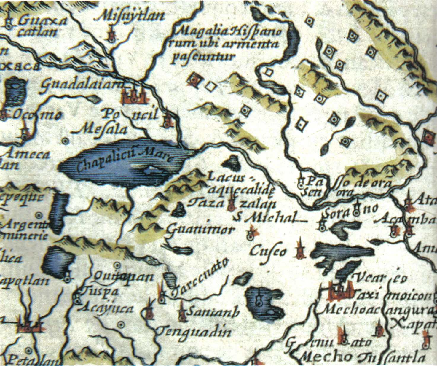 Flag Of Morelos